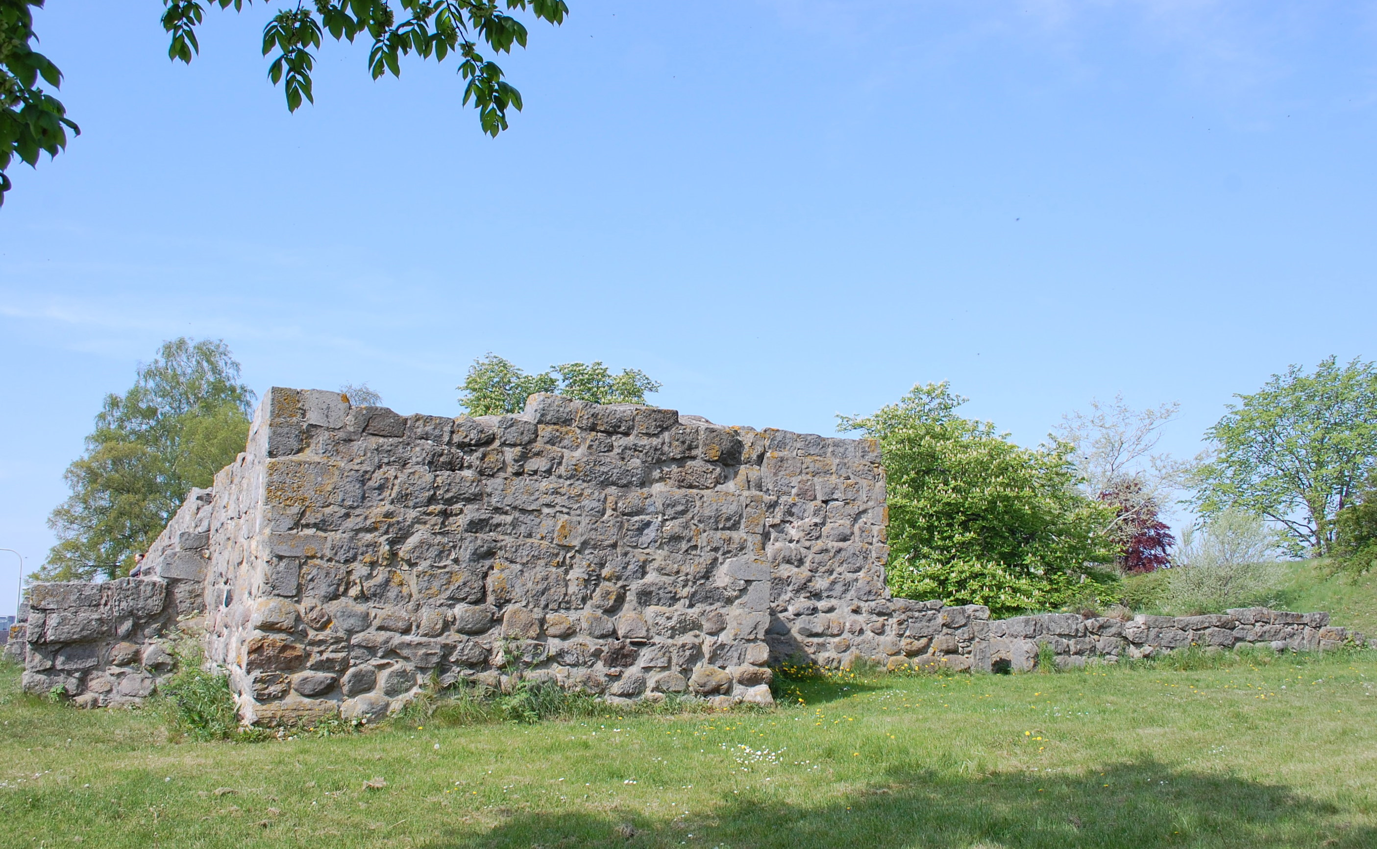 Schlossruine Aose hus in Åhus